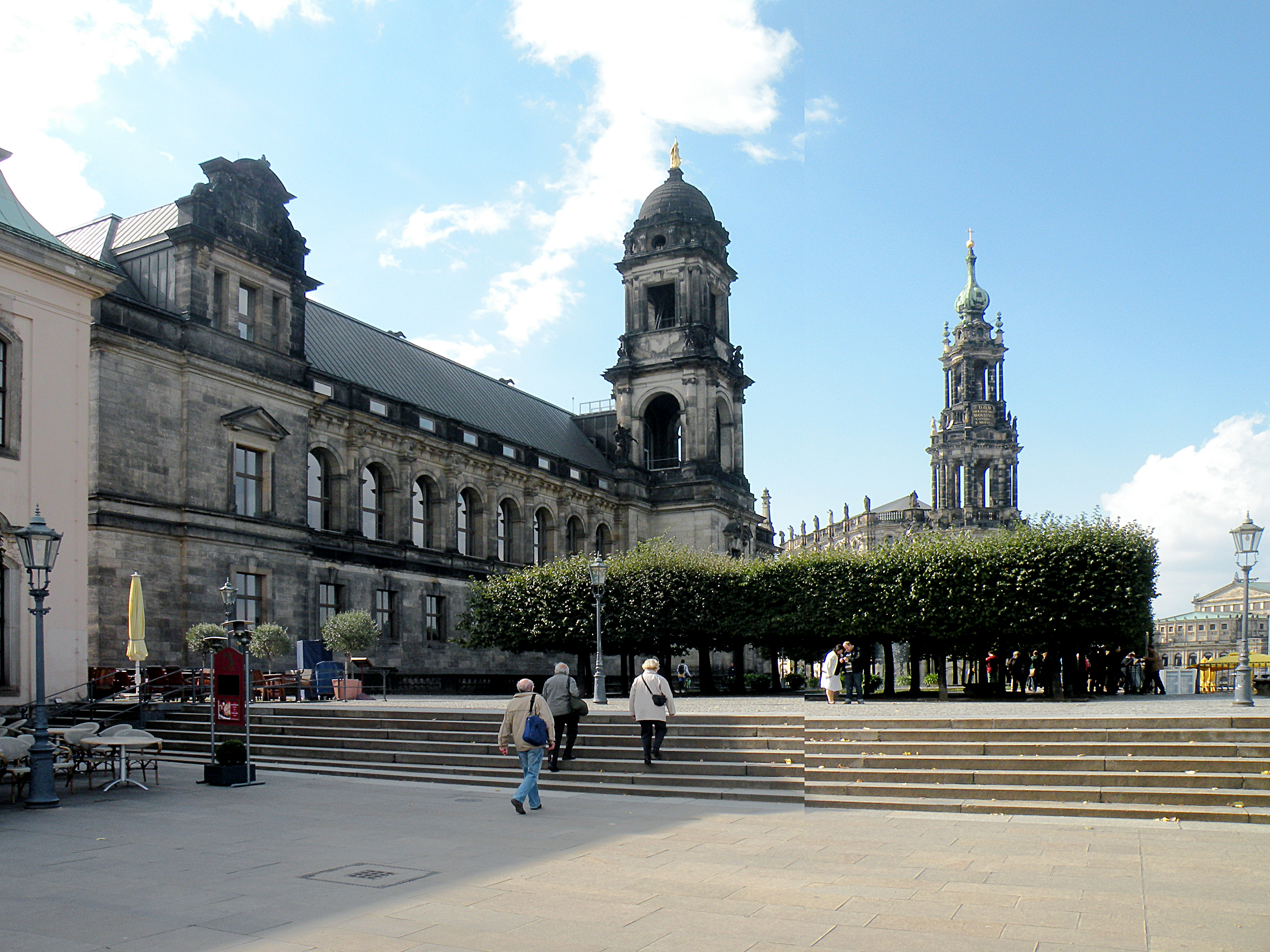 Staendehaus (Dresden}.